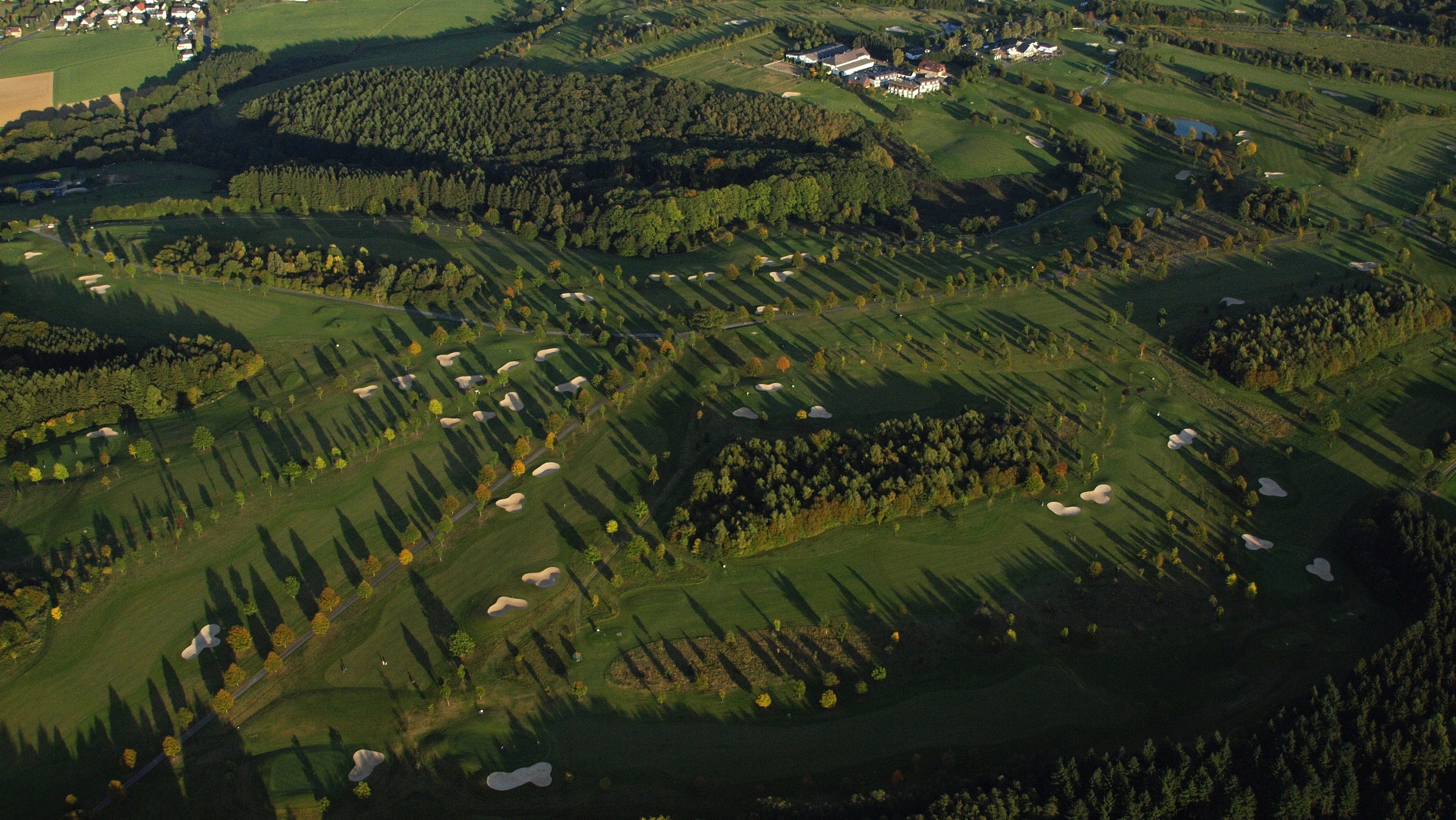 Golfanlage Heckenhof, Heckerhof: Luftaufnahme